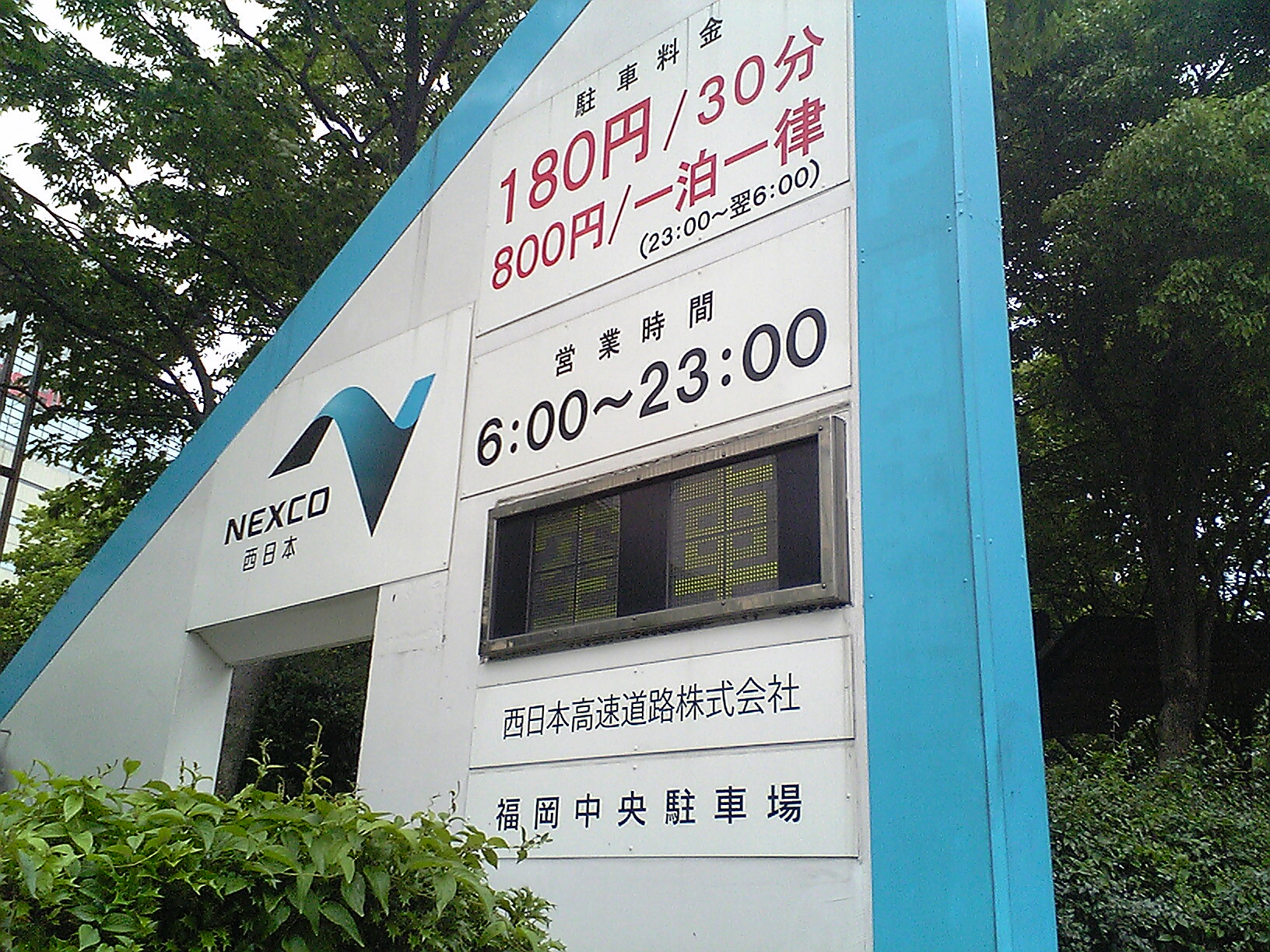 福岡市中央区天神にある、福岡中央駐車場。